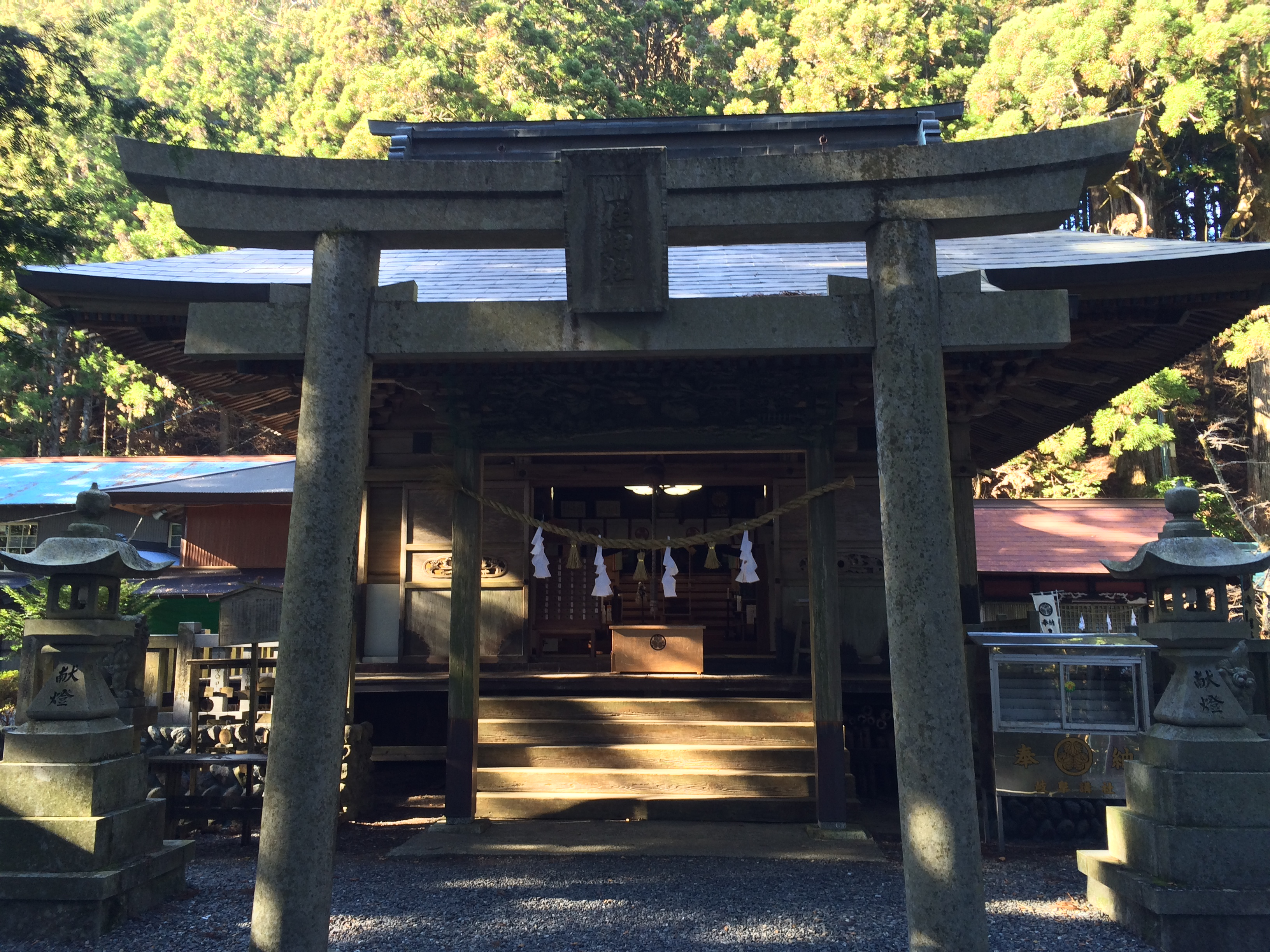 静岡県浜松市天竜区に鎮座する山住神社